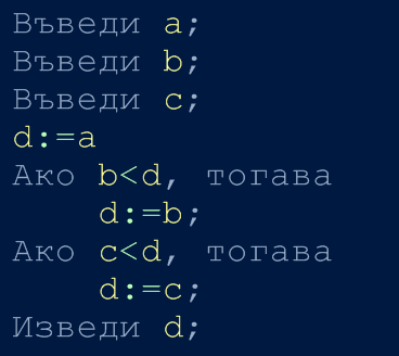 Псевдокод